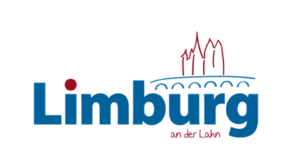 Logo der Stadt Limburg seit 2013